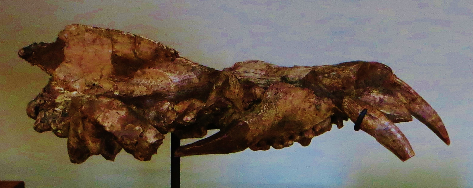 Fossil of Arctocyon, an extinct mammal- Took the photo at Museum Histoire Naturelle, Paris